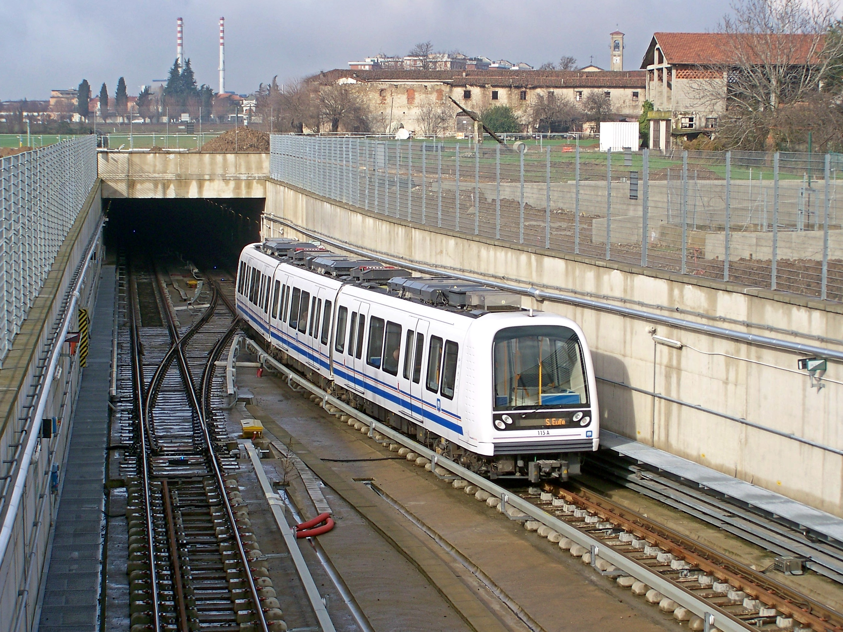 L'unità 115, in uscita dalla stazione di Poliambulanza e diretta al capolinea di Prealpino della metropolitana di Brescia, si appresta ad entrare nella tratta sotterranea della linea